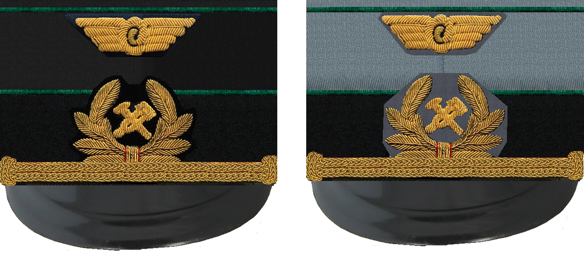 Фуражки МПС63